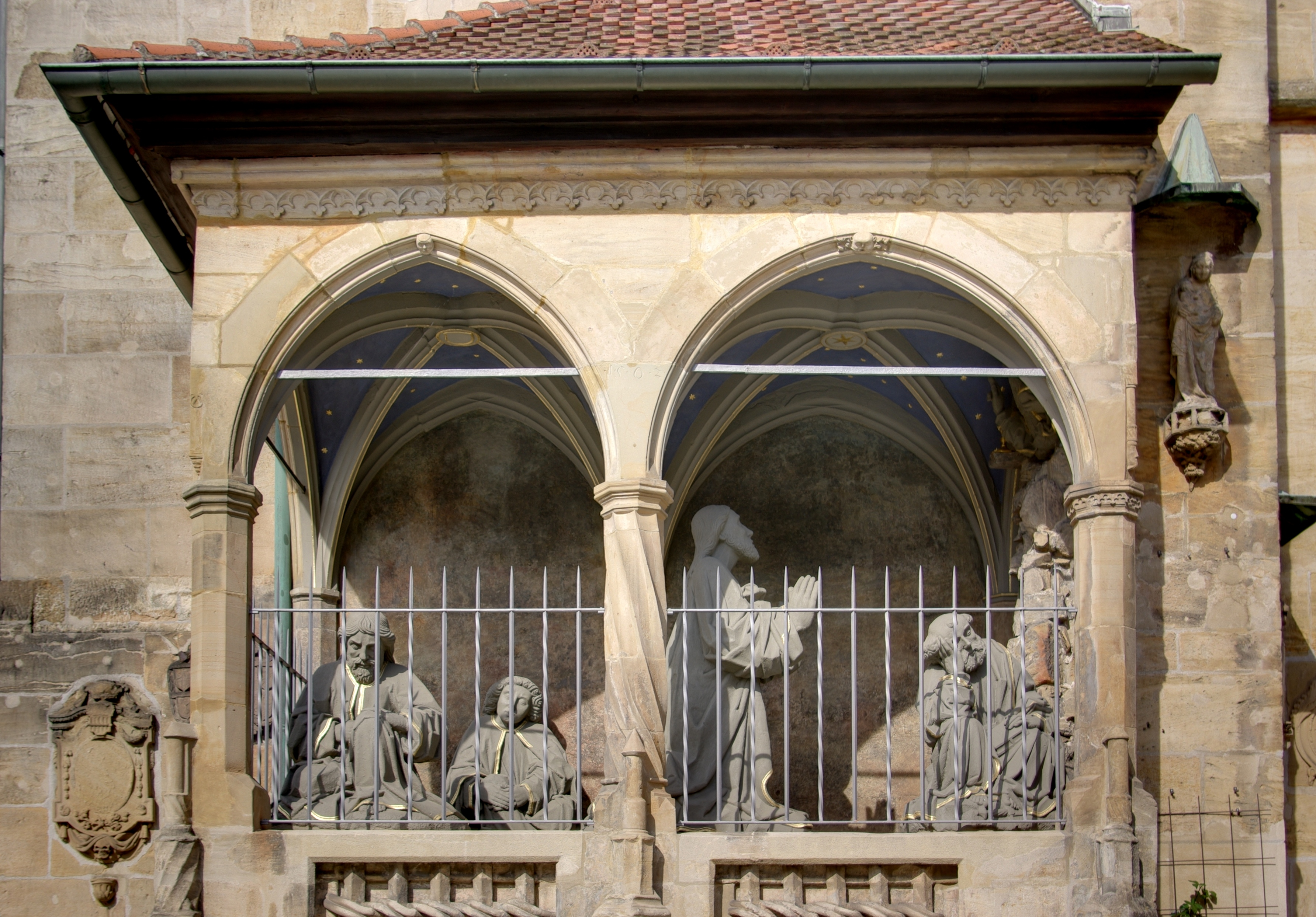 Bamberg, Obere Pfarre, Ölberg